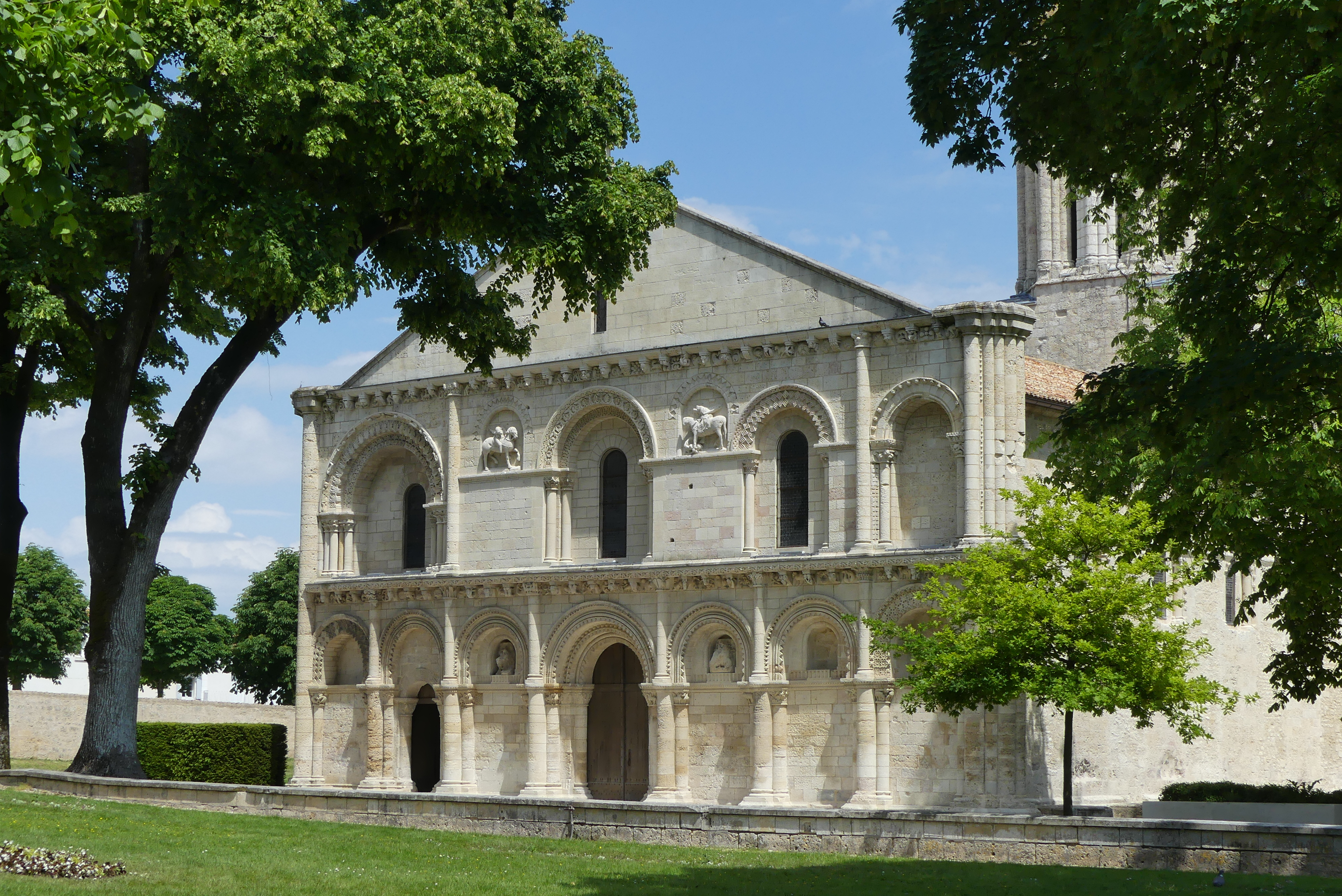 Surgères